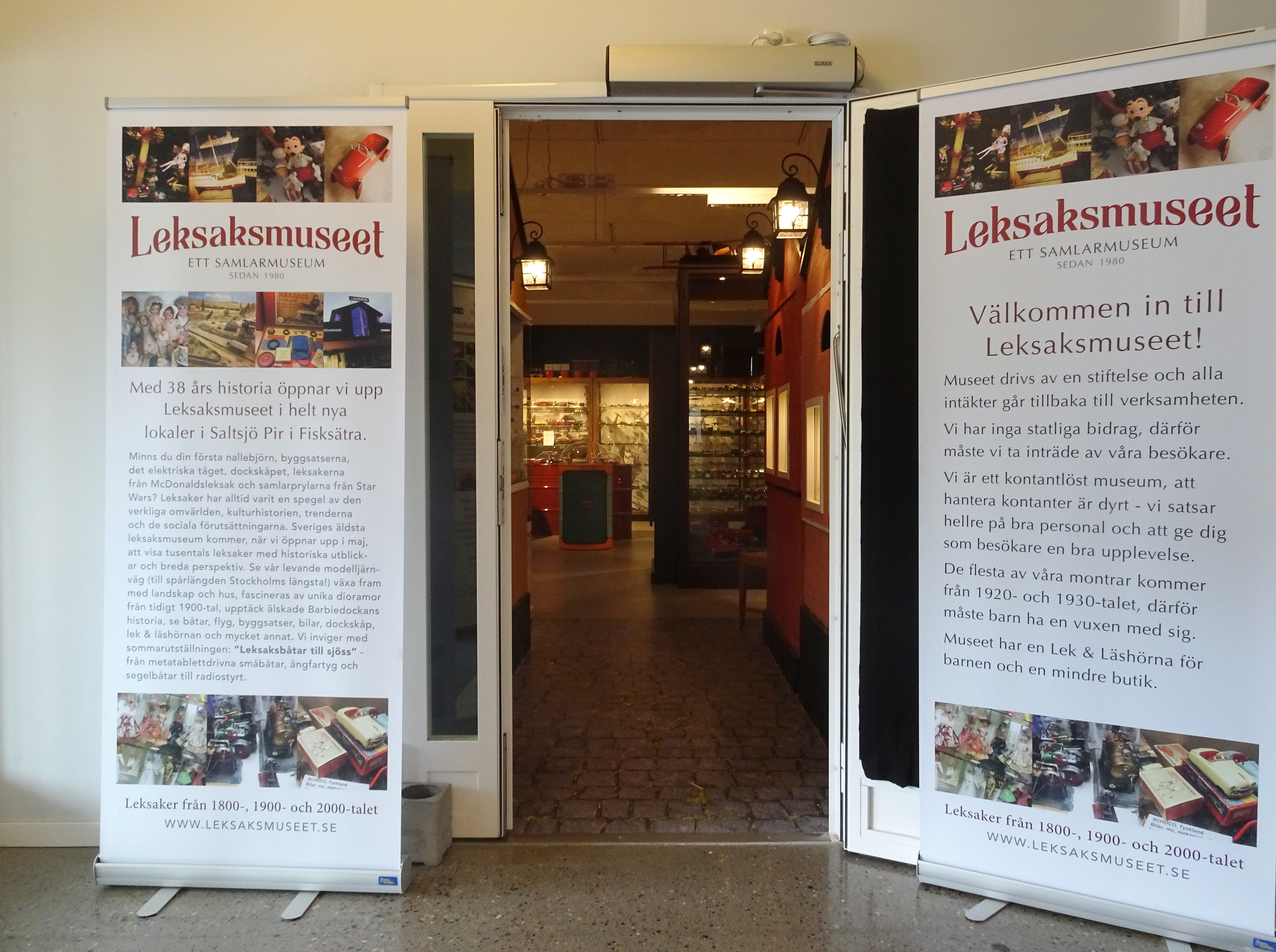 Leksaks och samlarmuseet, Fisksätra